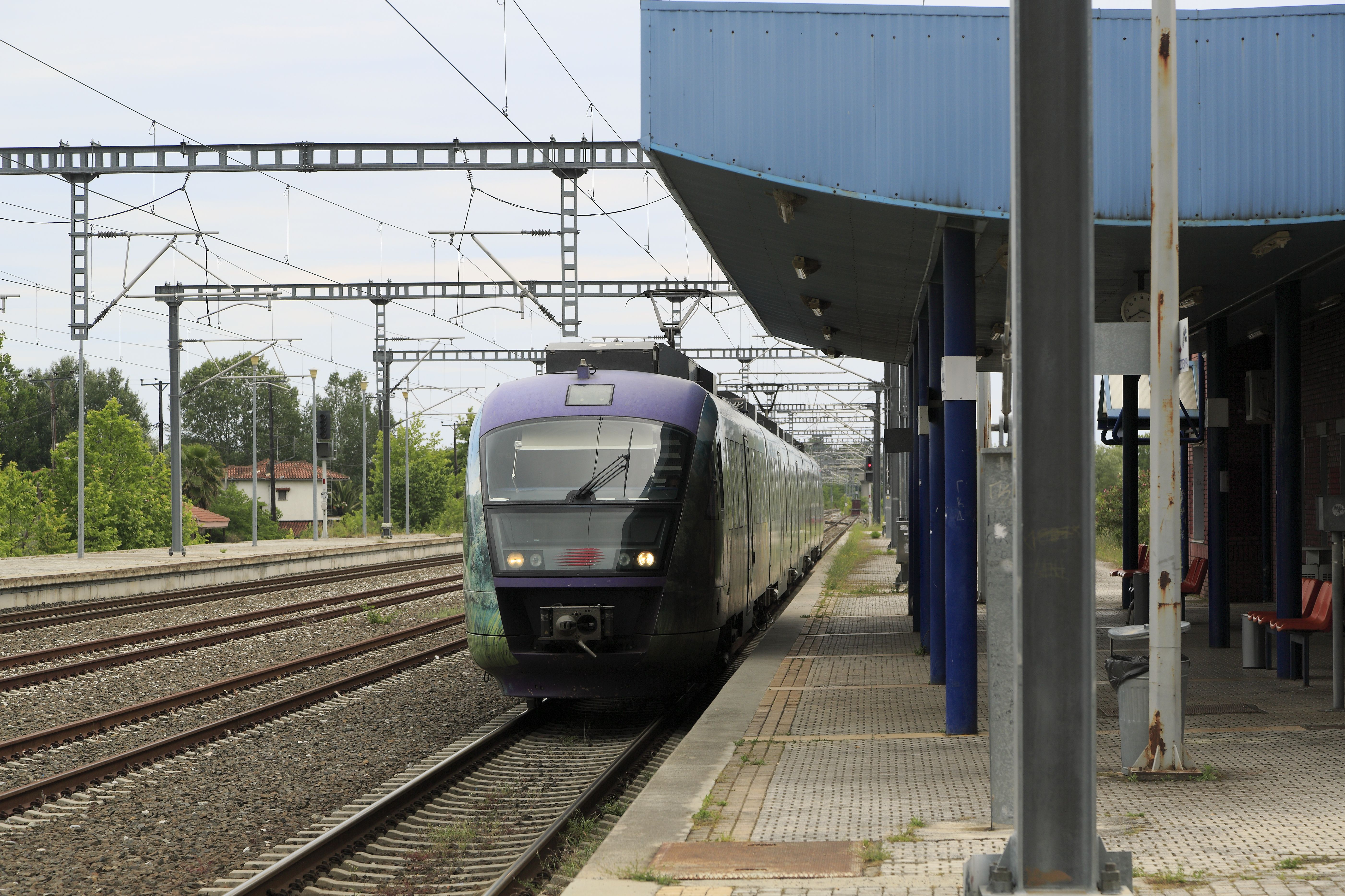 Proastiakós-Zug Thessaloníki–Larisa, Nachschuss. Trotzdem leuchten am Zugschluss die weißen Laternen. Die durchgehenden Hauptgleise sind an den rostigen Fahrflächen erkennbar ungeutzt.